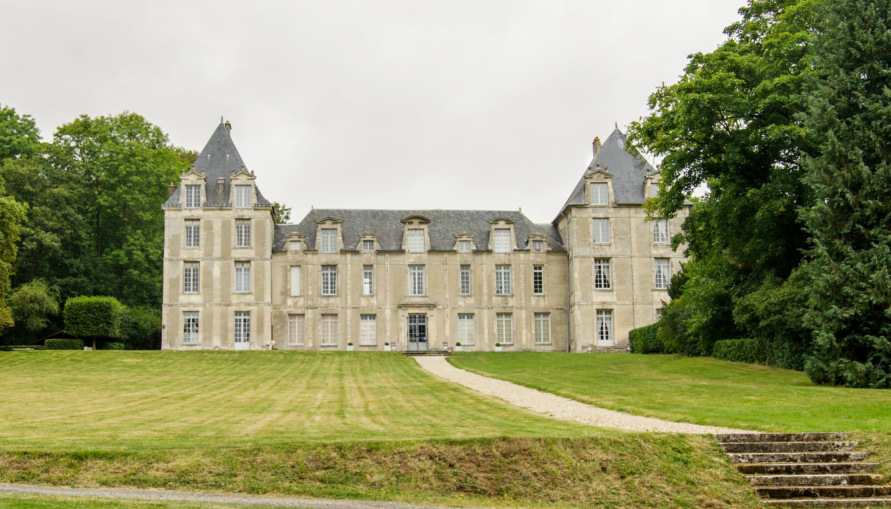 Château de Villers-en-Arthies (Val-d'Oise, France)